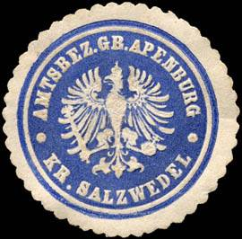 Sealing stamp Title: Amtsbezirk Gr. Apenburg - Kreis Salzwedel Description: blau, weiß, geprägt Place: Apenburg size: 3 cm